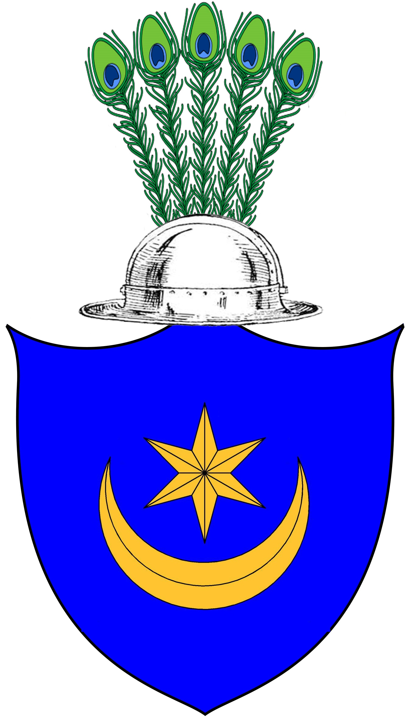 Леліва - Герб роду Сташкевичів